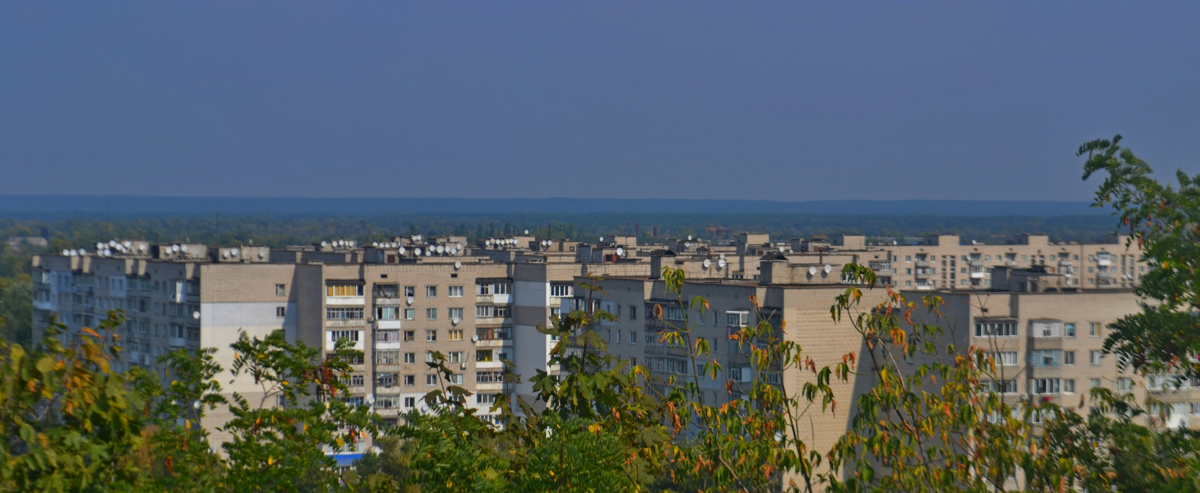 Панорама житлового масиву у Каневі